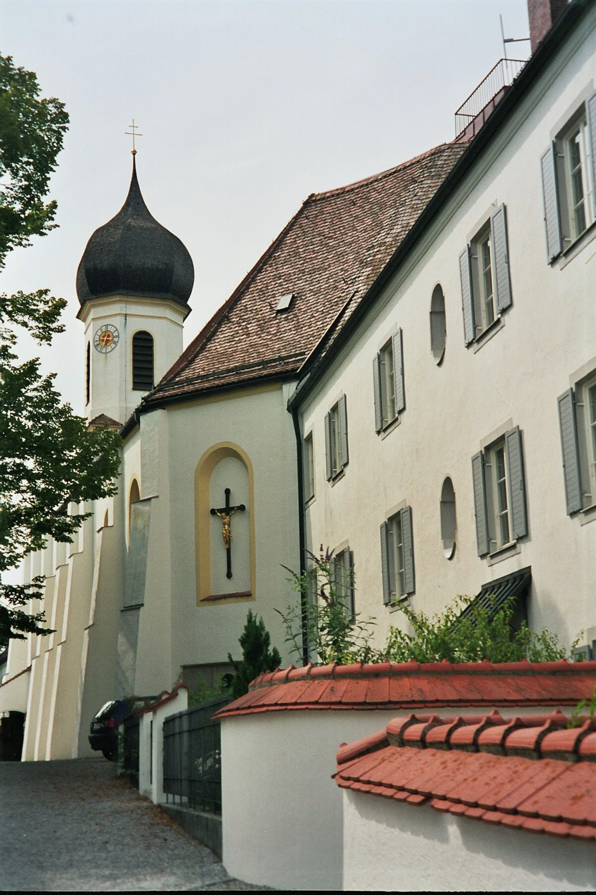 Die Wallfahrtskirche auf dem Peißenberg Autor: Benutzer:Jan G